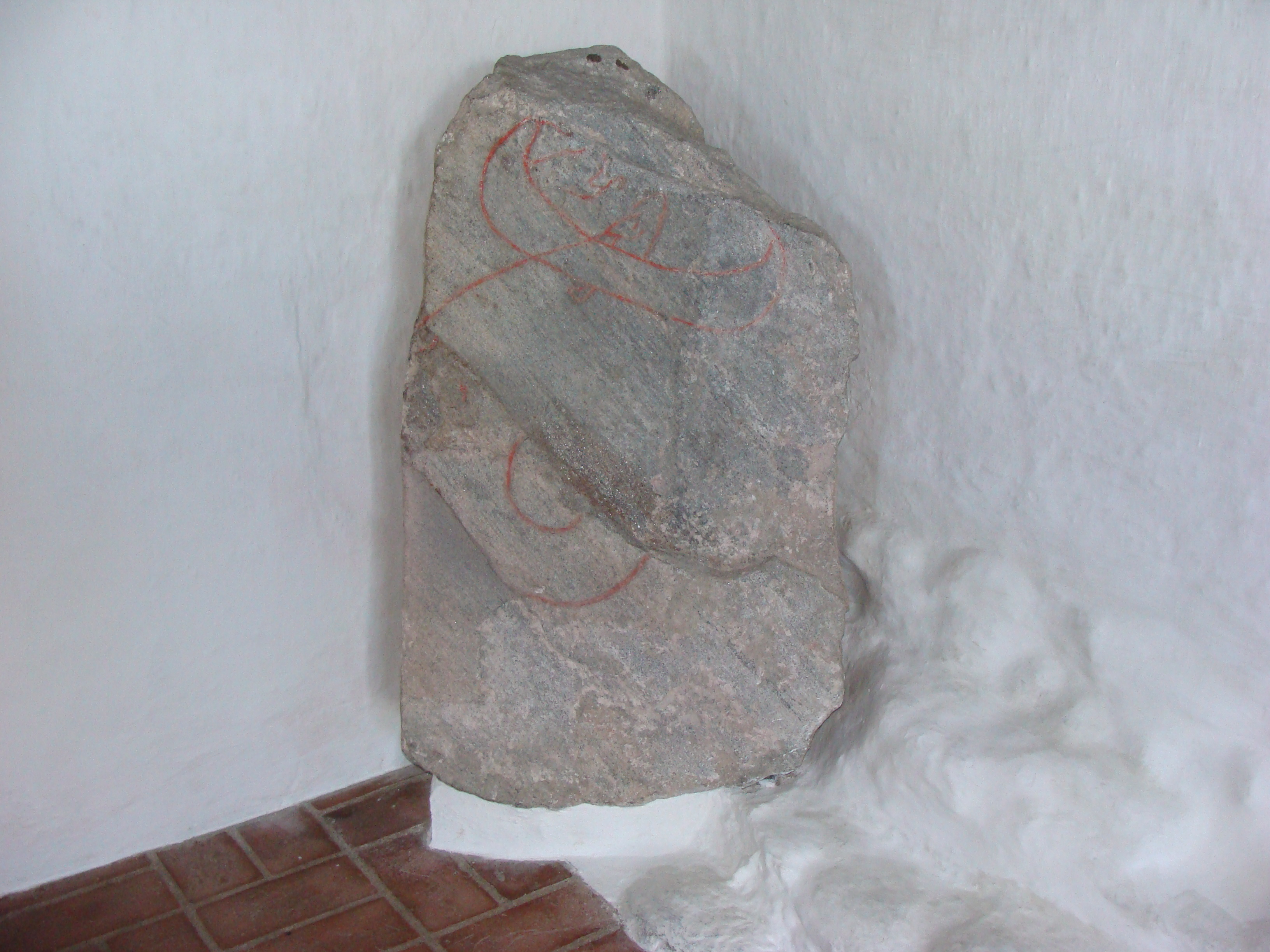 Thorstenen i Hørdum Kirke, Thy. Thor fanger Midgårdsormen.